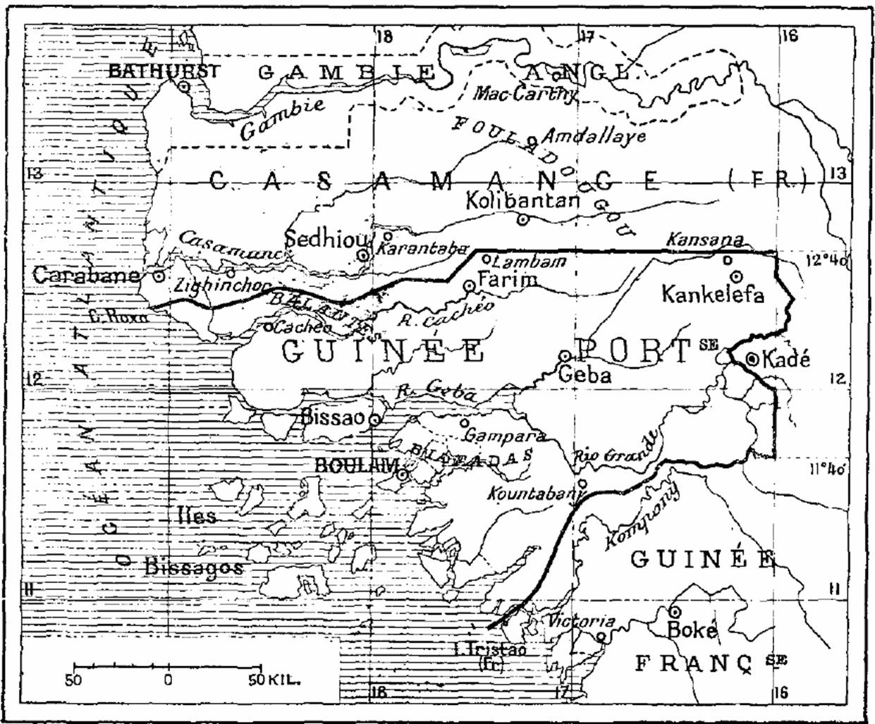 Carte de la Guinée française et de la Casamance (A travers le monde, n° 3, 20 janvier 1906, p. 17)